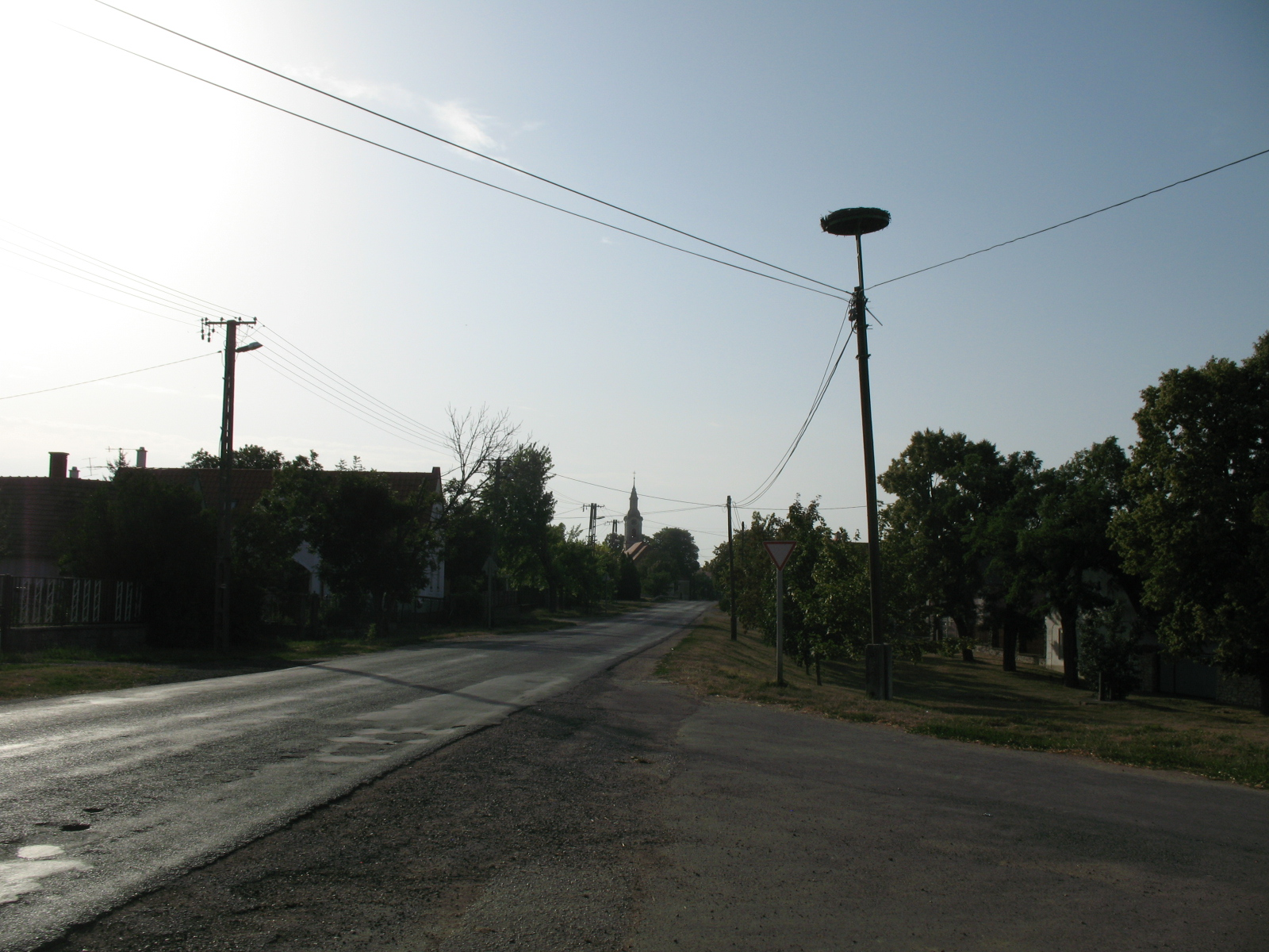 Nagyvázsony